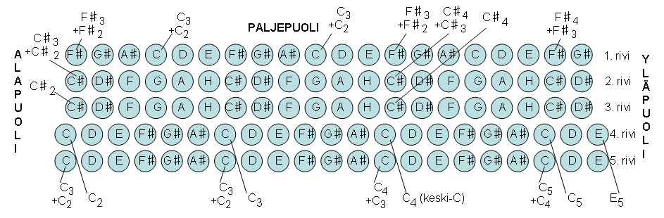 Pietro Frosinin harmonikassaan käyttämä bassojärjestelmä. Kaavio suomeksi. Tehty kirjan "The Golden Age of Accordion, Flynn, Davison, Chavez, s. 81 pohjalta.